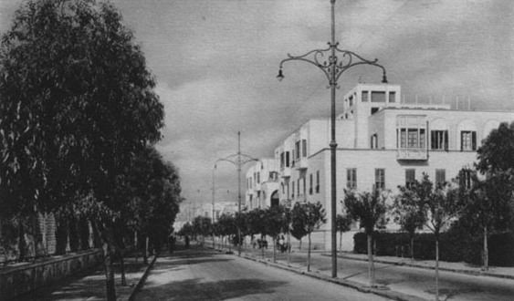 Benghazi Independence Street (now Gamal Abdulnasser St.)